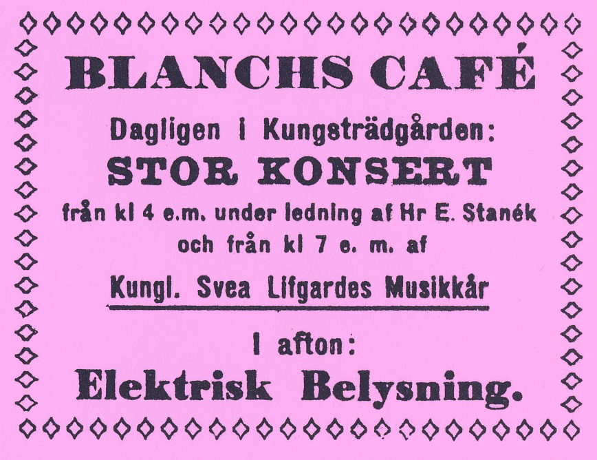 "I afton: Elektrisk Belysning", Blanchs Café i Stockholm